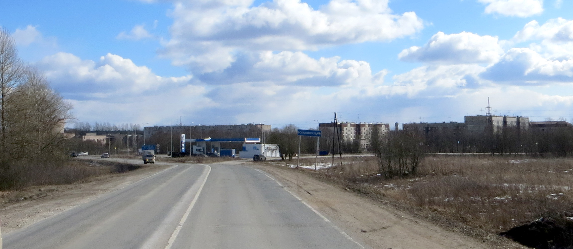 Посёлок Войсковицы